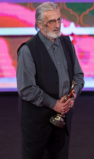 فریدون شهبازیان در بیست و یکمین جشن سینمای ایران - شهریور ۱۳۹۸